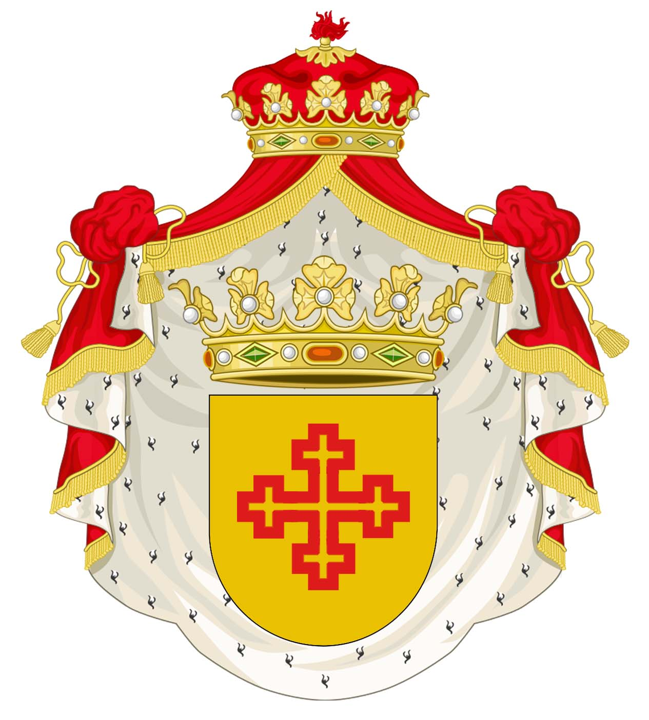 Escudo de armas del Ducado de Elío